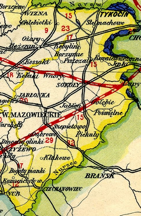 Jest to fragment mapy Królestwa Polskiego z 1914 roku, skala 1: 840 000. 4 lutego 1919 przywrócono Wysokiemu Mazowieckiemu (Mazowieckowi) prawa miejskie, przez co miasto wyłączono z gminy, której nazwę zmieniono na Wysokie Mazowieckie. Sejm Ustawodawczy w dniu 2 sierpnia 1919 roku przyjął ustawę o podziale administracyjnym kraju i utworzeniu województwa białostockiego. 15 sierpnia 1919 roku decyzją Sejmu utworzono powiat wysokomazowiecki, należący do tego województwa. Na terenie powiatu były 3 miasta i 9 gmin wiejskich.